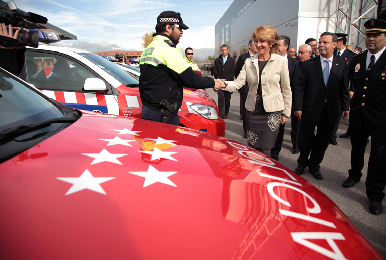 Actos de Esperanza